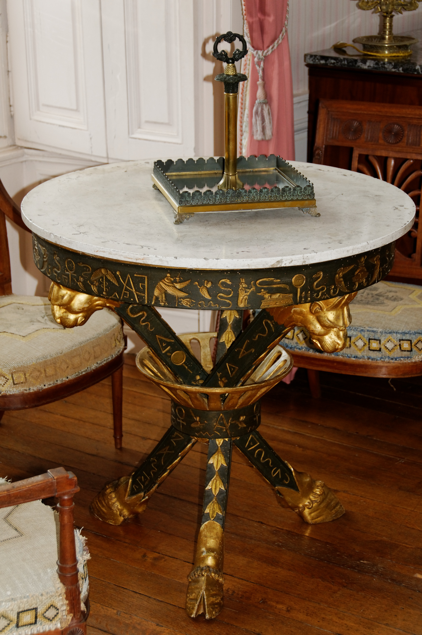 Château de Valençay, guéridon « égyptisant » à têtes de lions dans la chambre de Madame de Staël (destiné à l'origine à un temple égyptien prévu dans le parc), Valençay, Indre, France